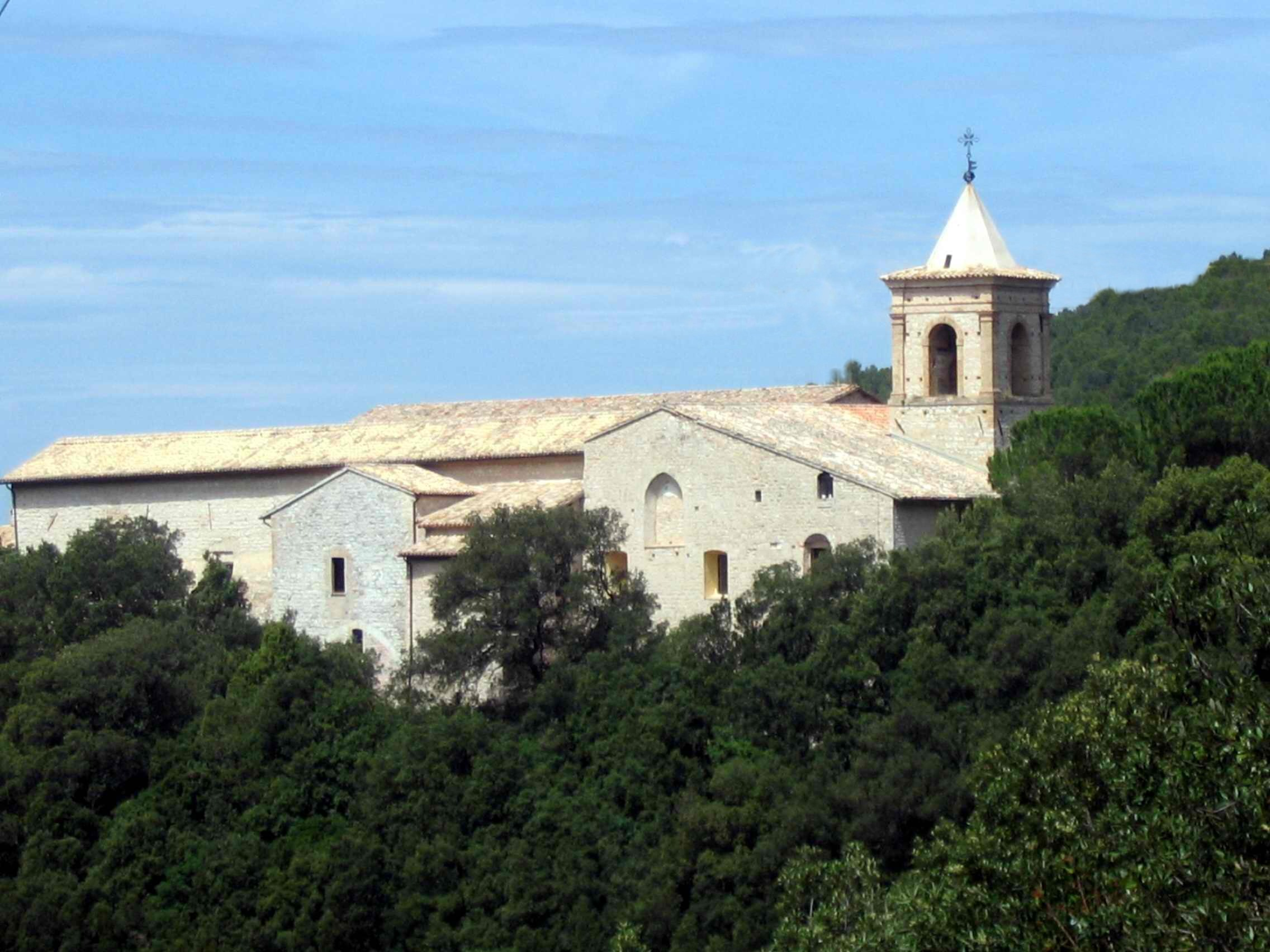 abbazia di Sassovivo, Foligno, Perugia, Umbria, Italy